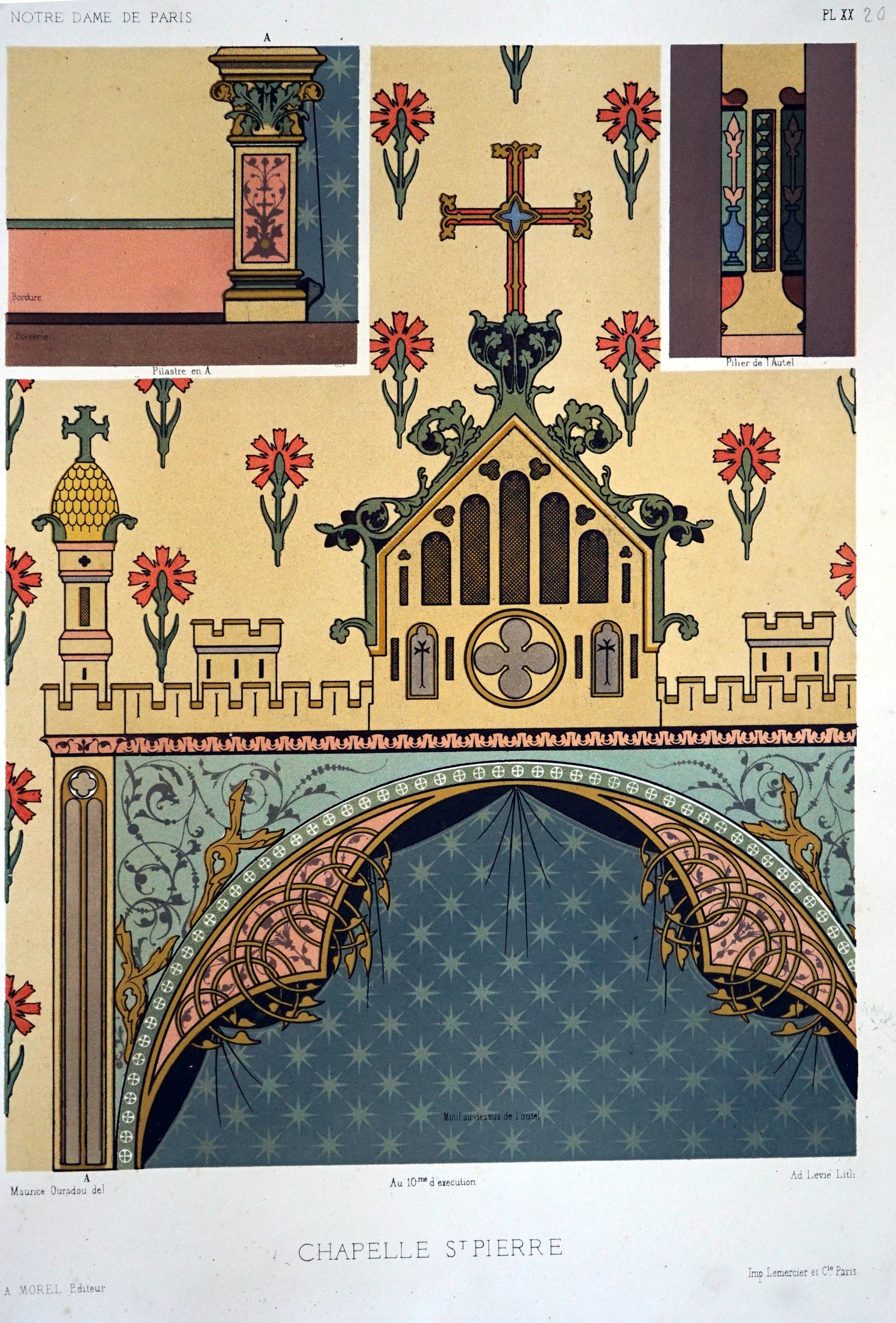 écrit par M Ourodou sur des dessine de Viollet le Duc.